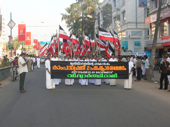 കാമ്പസ് ഫ്രണ്ട് രണ്ടാം വാർഷിക സമ്മേളനത്തിൻറെ റാ‍ലിയുടെ മുൻ നിര.